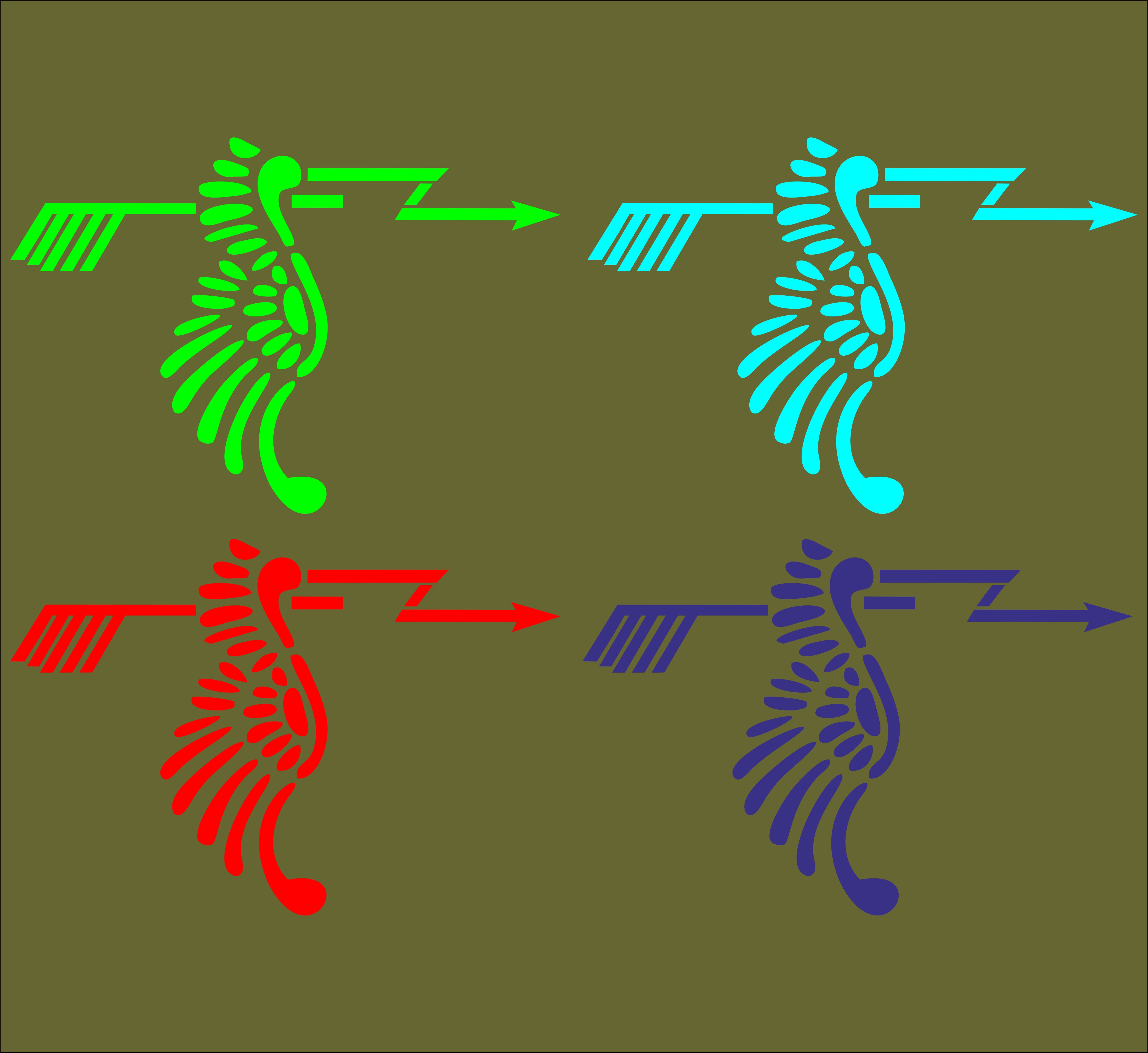 Godło na samolotach 121 eskadry myśliwskiej stosowany w latach 1927 - 1932